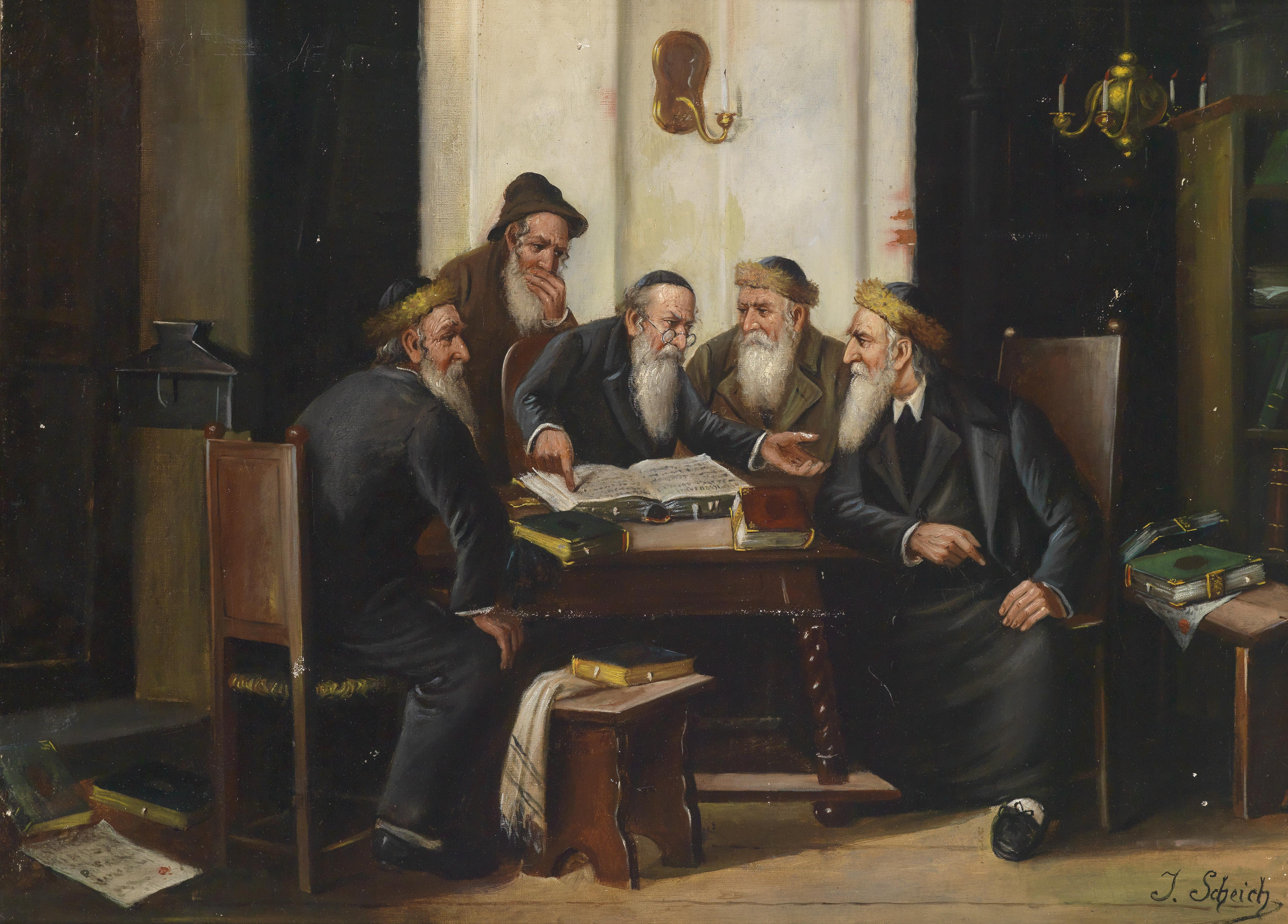 Die Talmud-Stunde. Signiert J. Scheich, Öl auf Leinwand, 58 x 79 cm